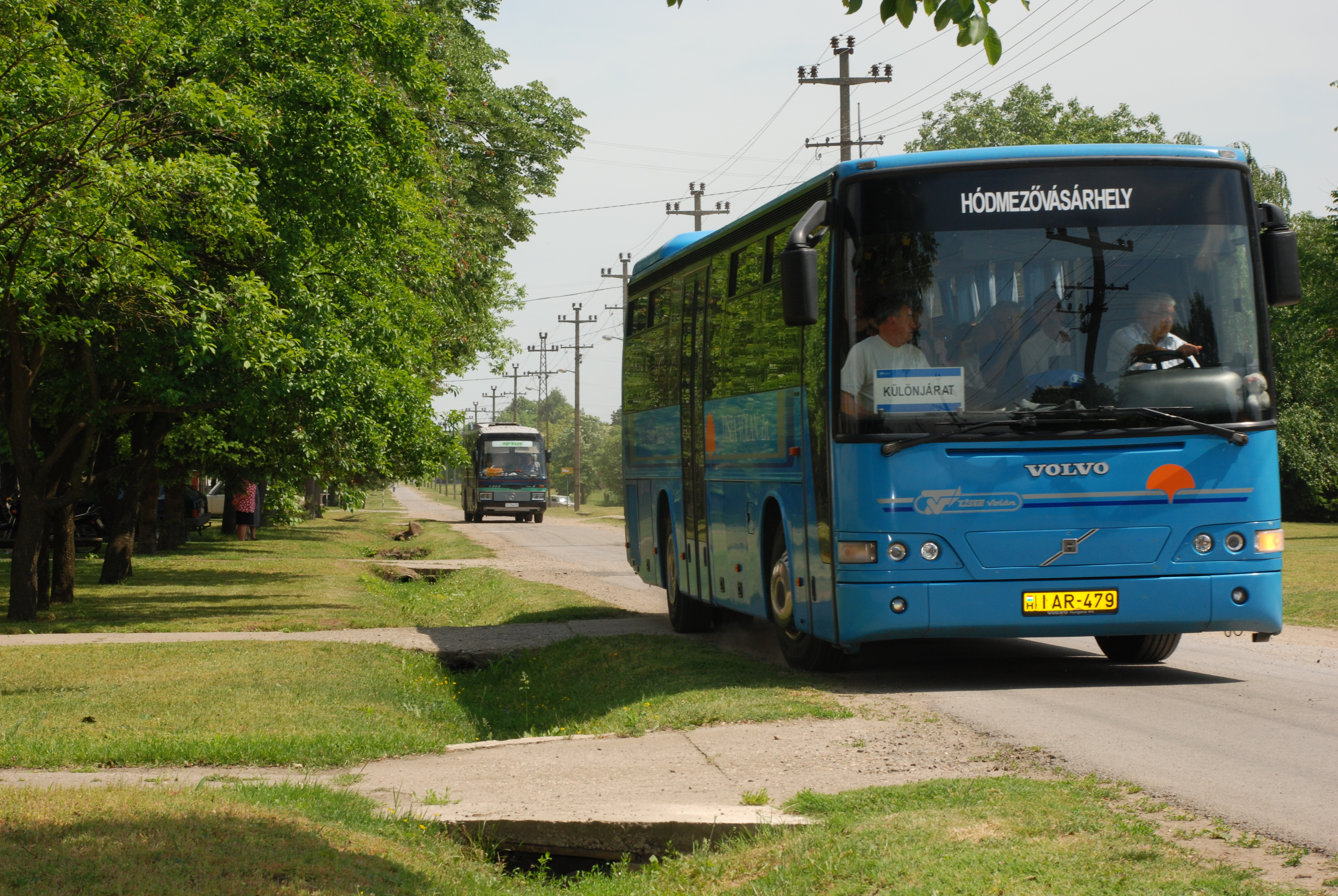 Šušara KUD 20-ta smotra folklora Madarske nacionalnosti. 2009 g.